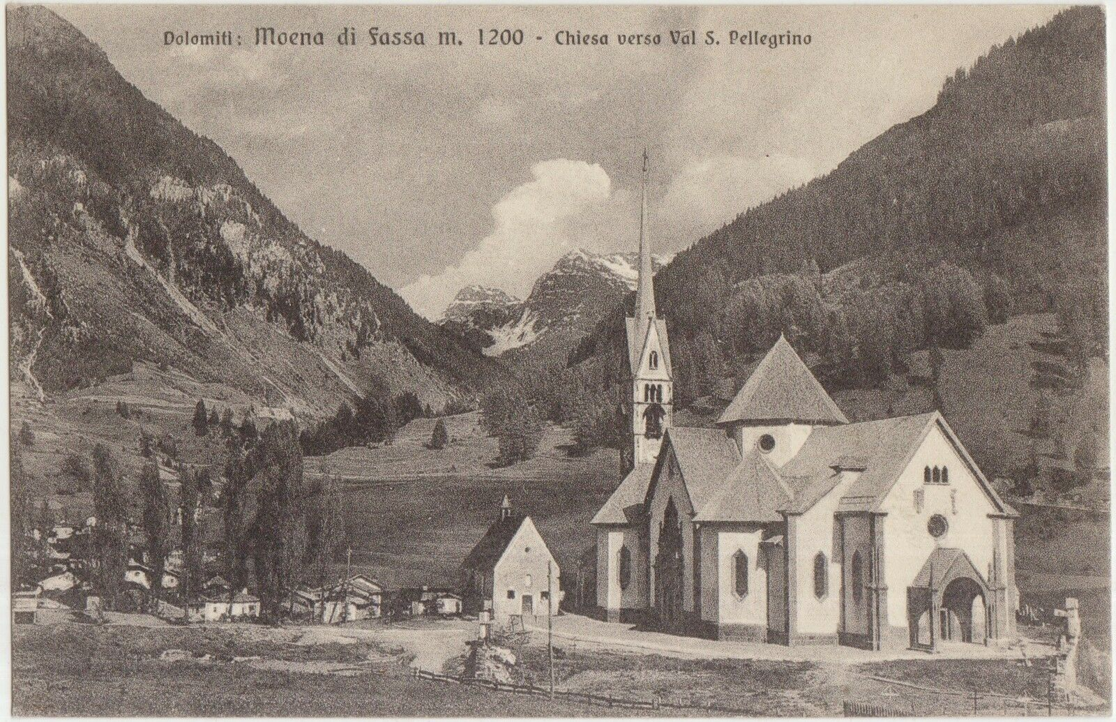 Dolomiti - Moena di Fassa m. 1200 - Chuesa verso Val S. Pellegrino